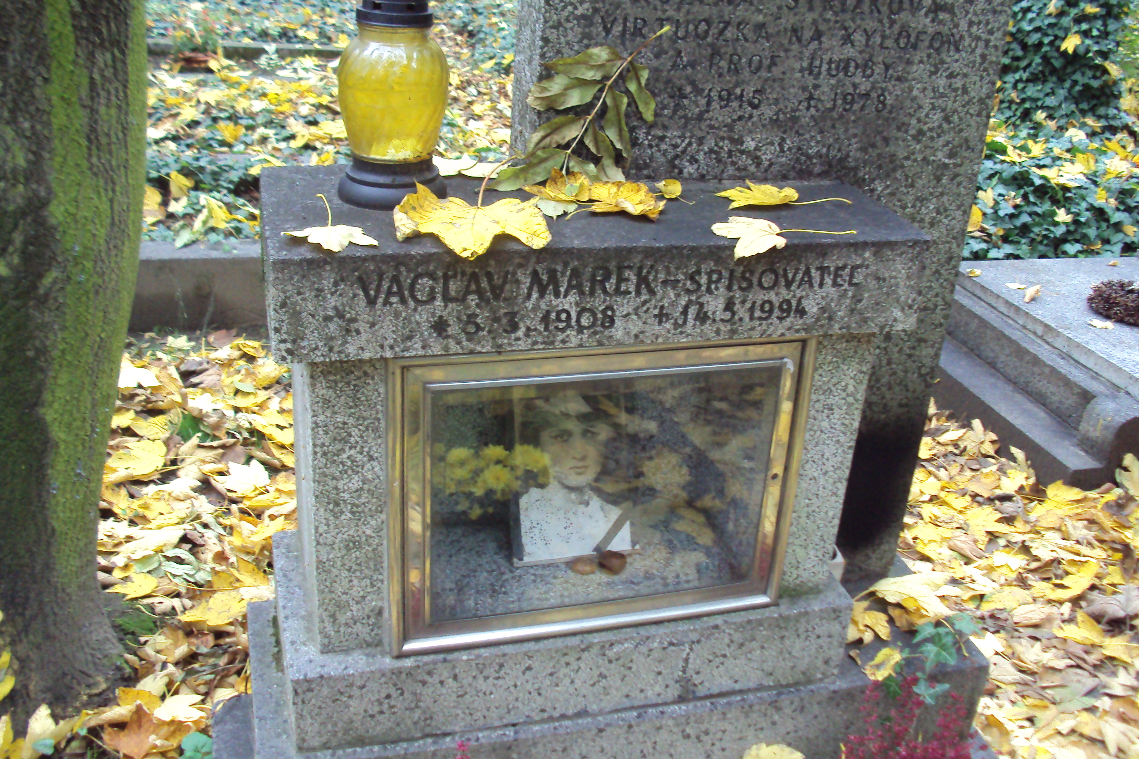 Hrob spisovatele na Olšanech, hřbitov VIII, oddělení 4